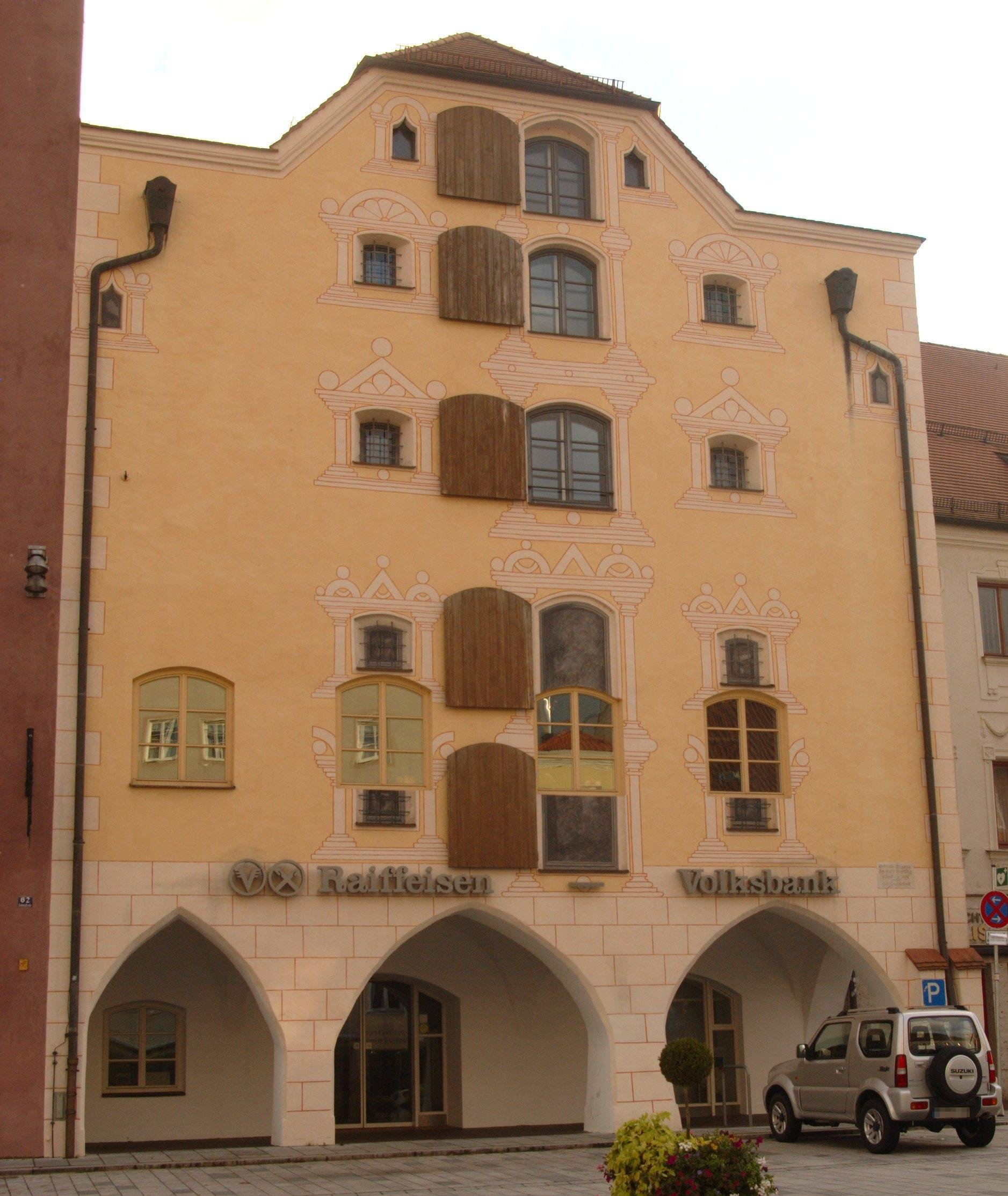 Neuötting, ehem. Getreidekasten, jetzt Teil des Rathauses (Stadtsaal)